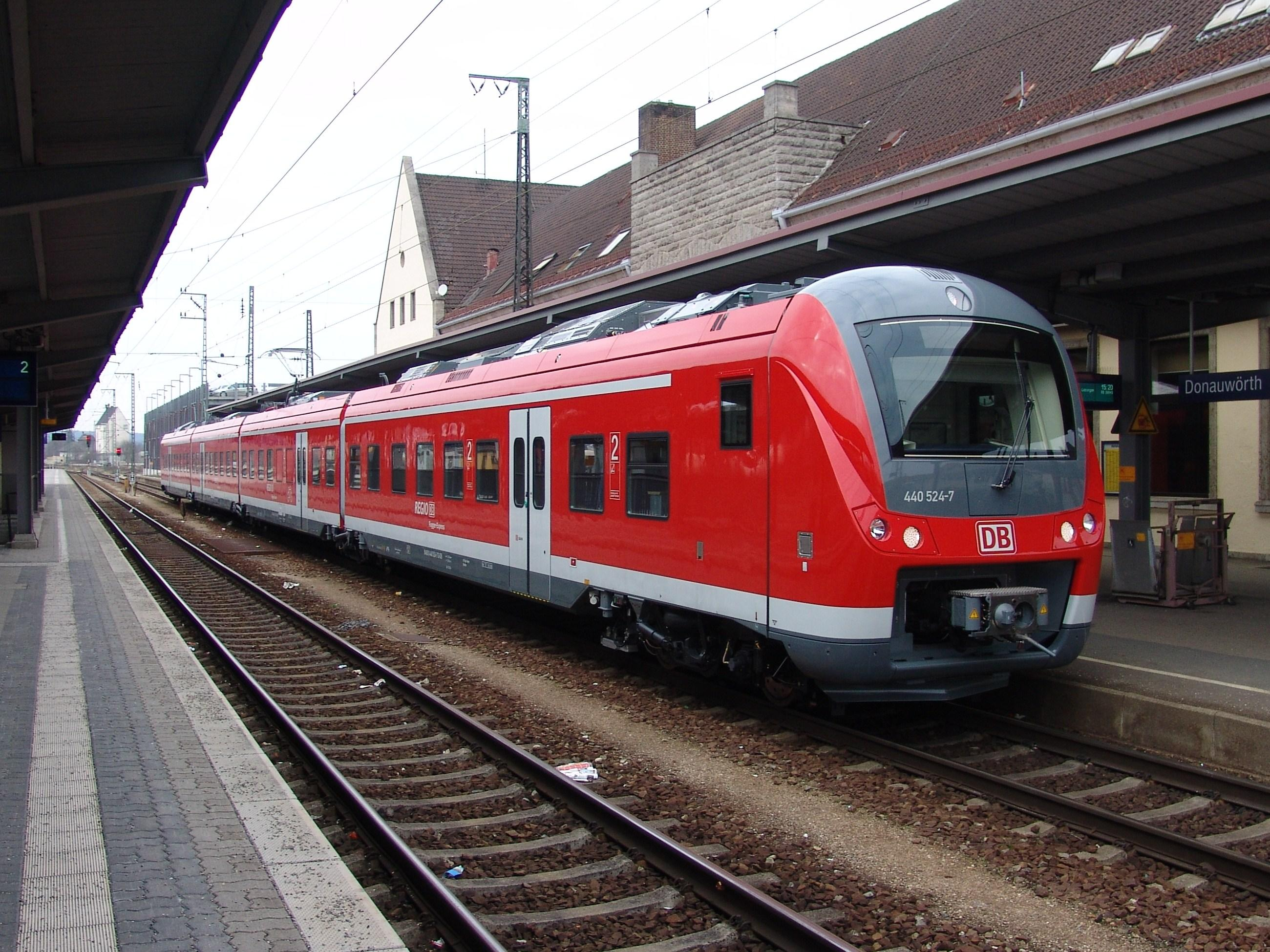 440 024 im Bahnhof Donauwörth kurz vor der Abfahrt als Regionalbahn nach Augsburg Hbf.